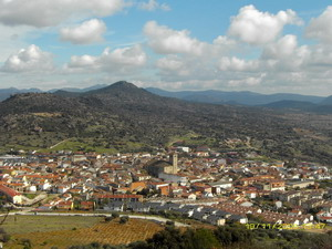 Vista panorámica del municipio abulenese de Cebreros (España).